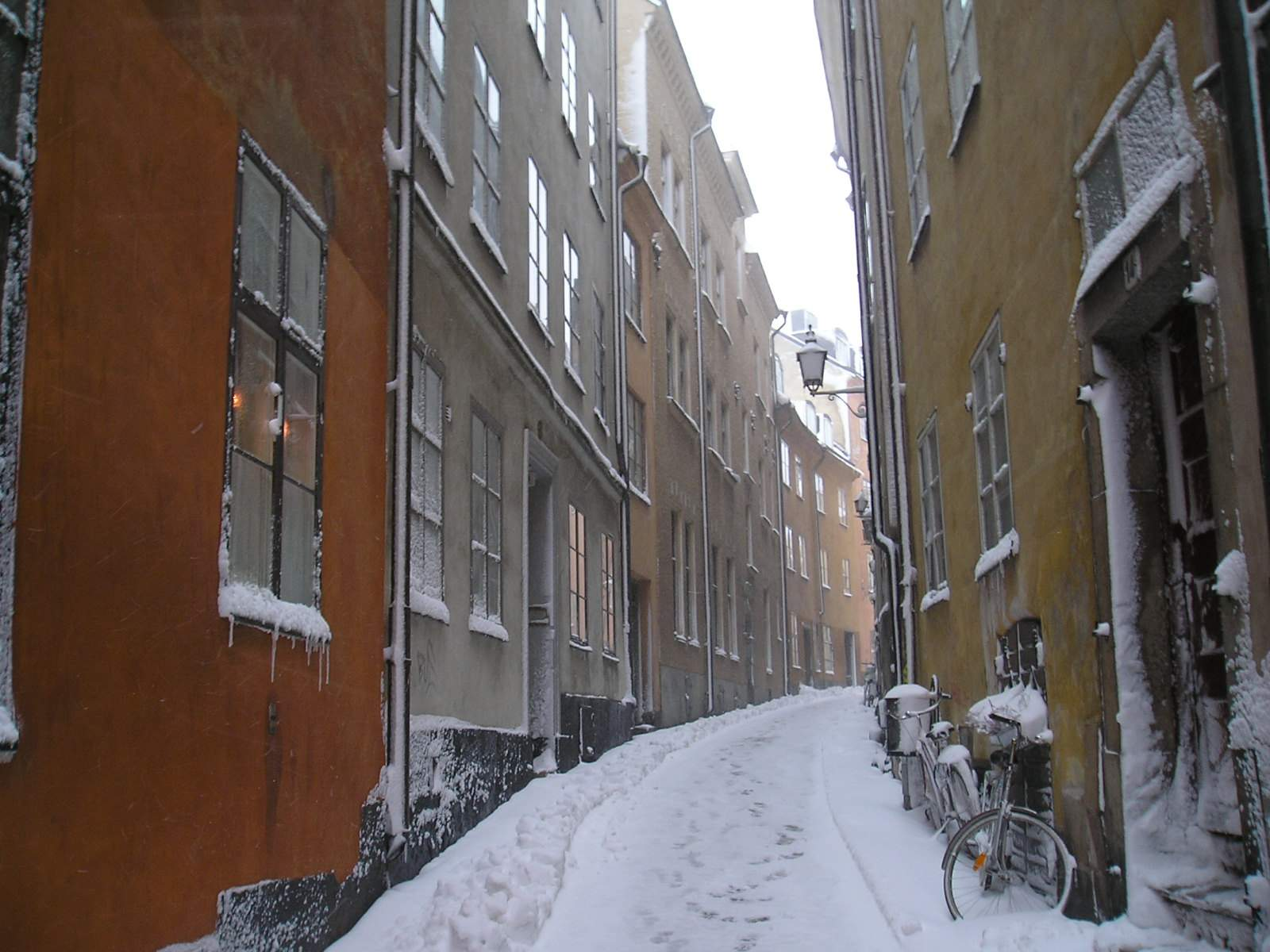 Baggensgatan, tagit av Keja